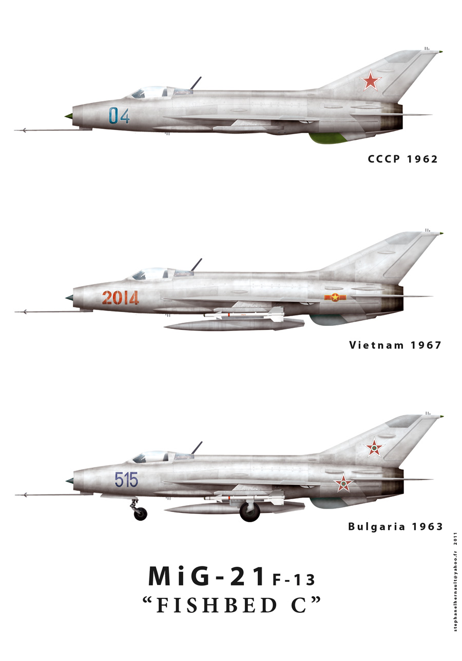 Mig 21 F13 Fishbed C URSS Vietnam Bulgarie